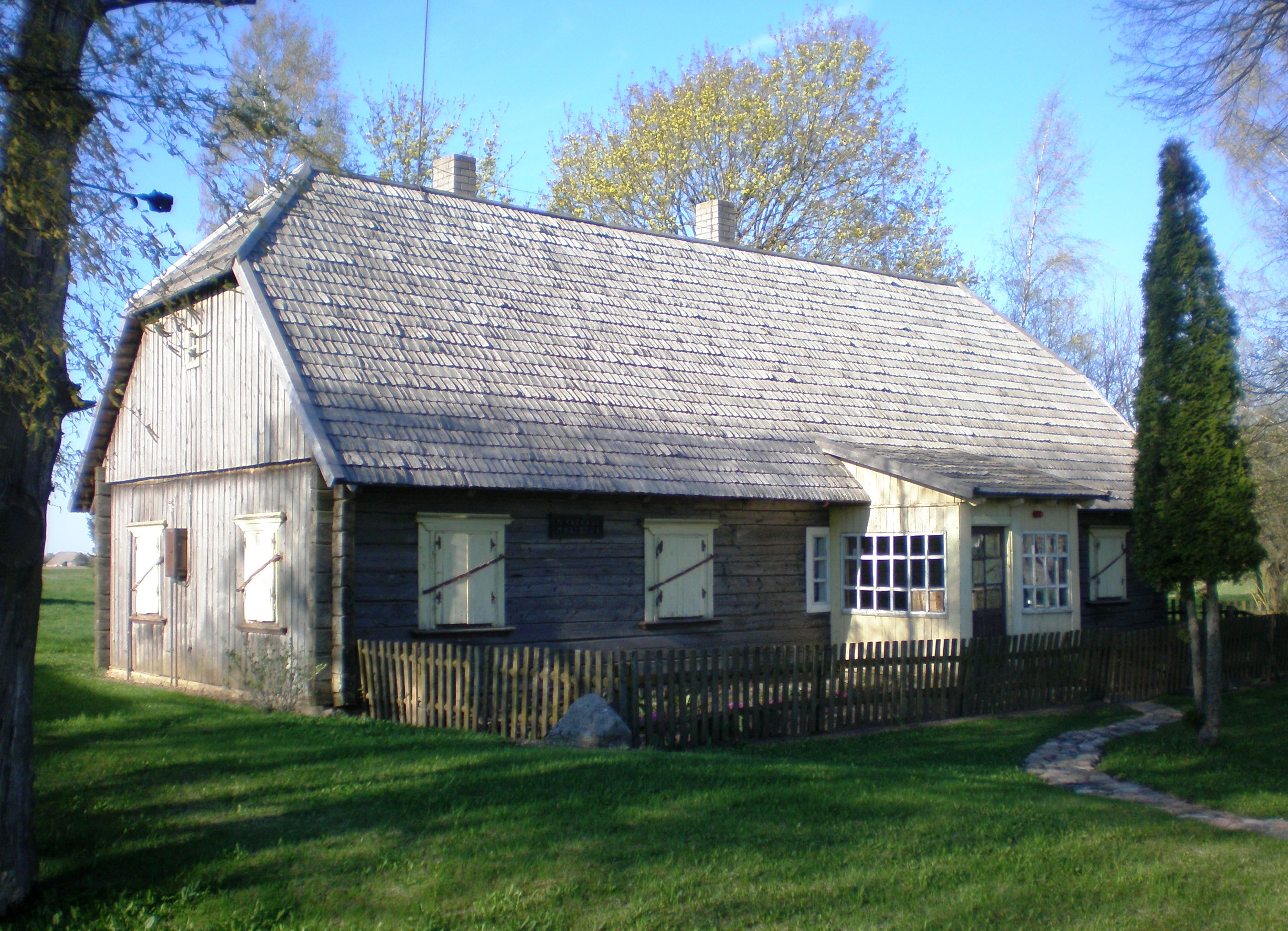 M. Katkaus namas, Ažytėnai, Krakių sen., Kėdainių raj.